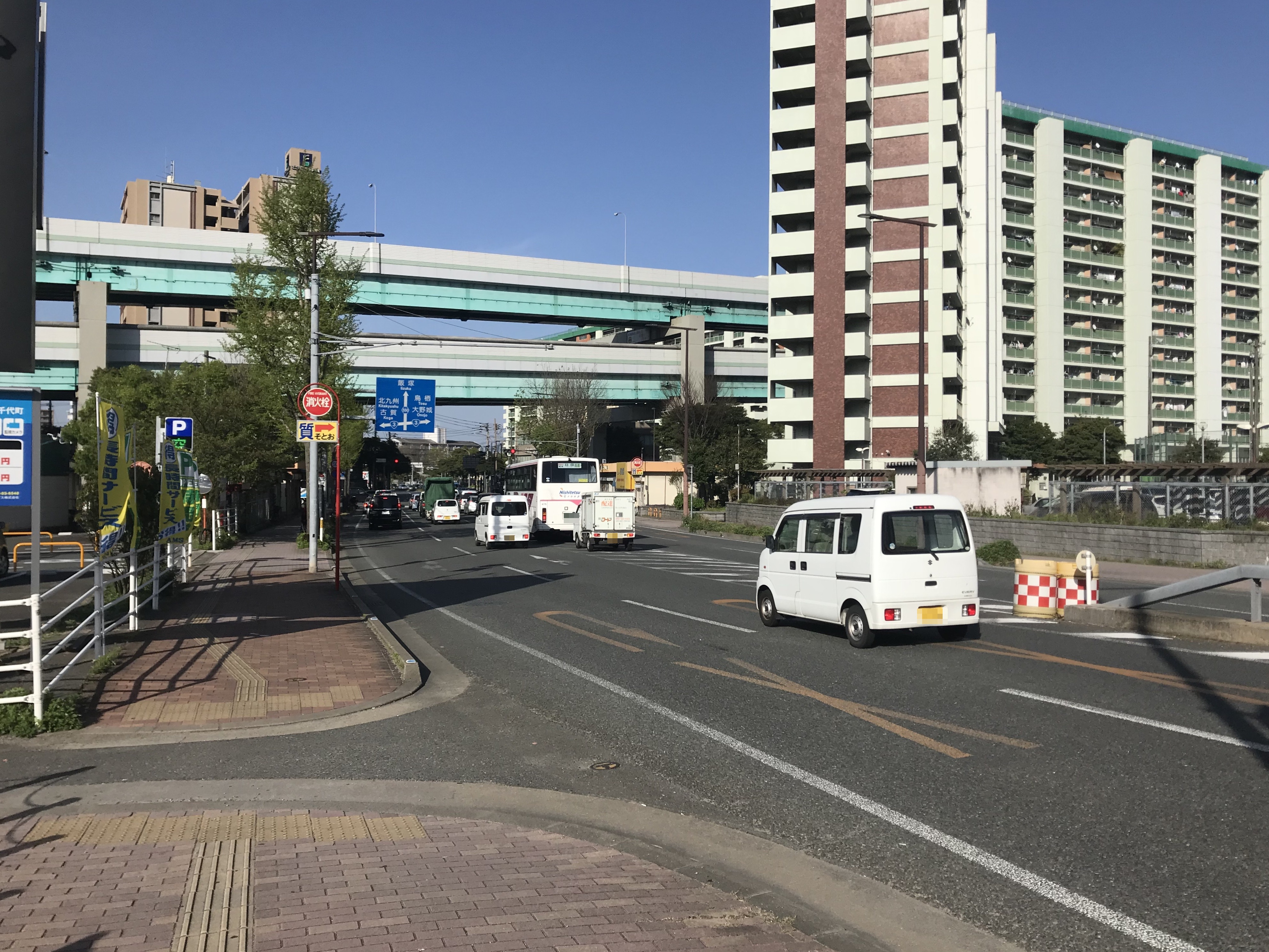 国道202号・緑橋より望む福岡都市高速環状線